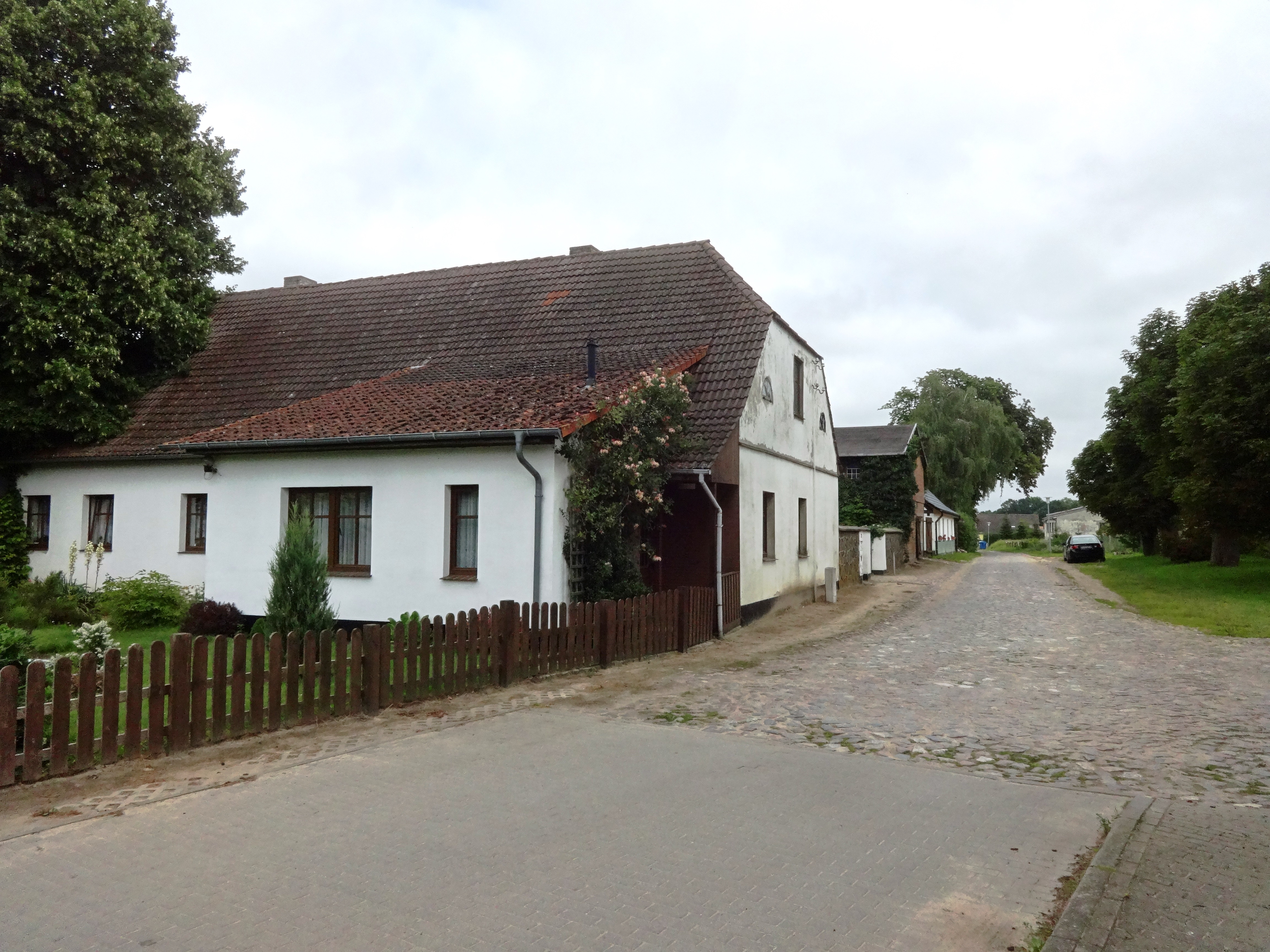 Netzeband, ein Ortsteil der Gemeinde Katzow im Landkreis Vorpommern-Greifswald in Mecklenburg-Vorpommern